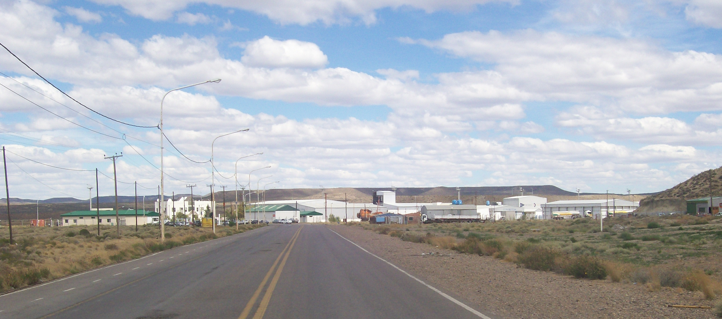 vista al puerto desde la Avda. Ingeniro Carlos Lando